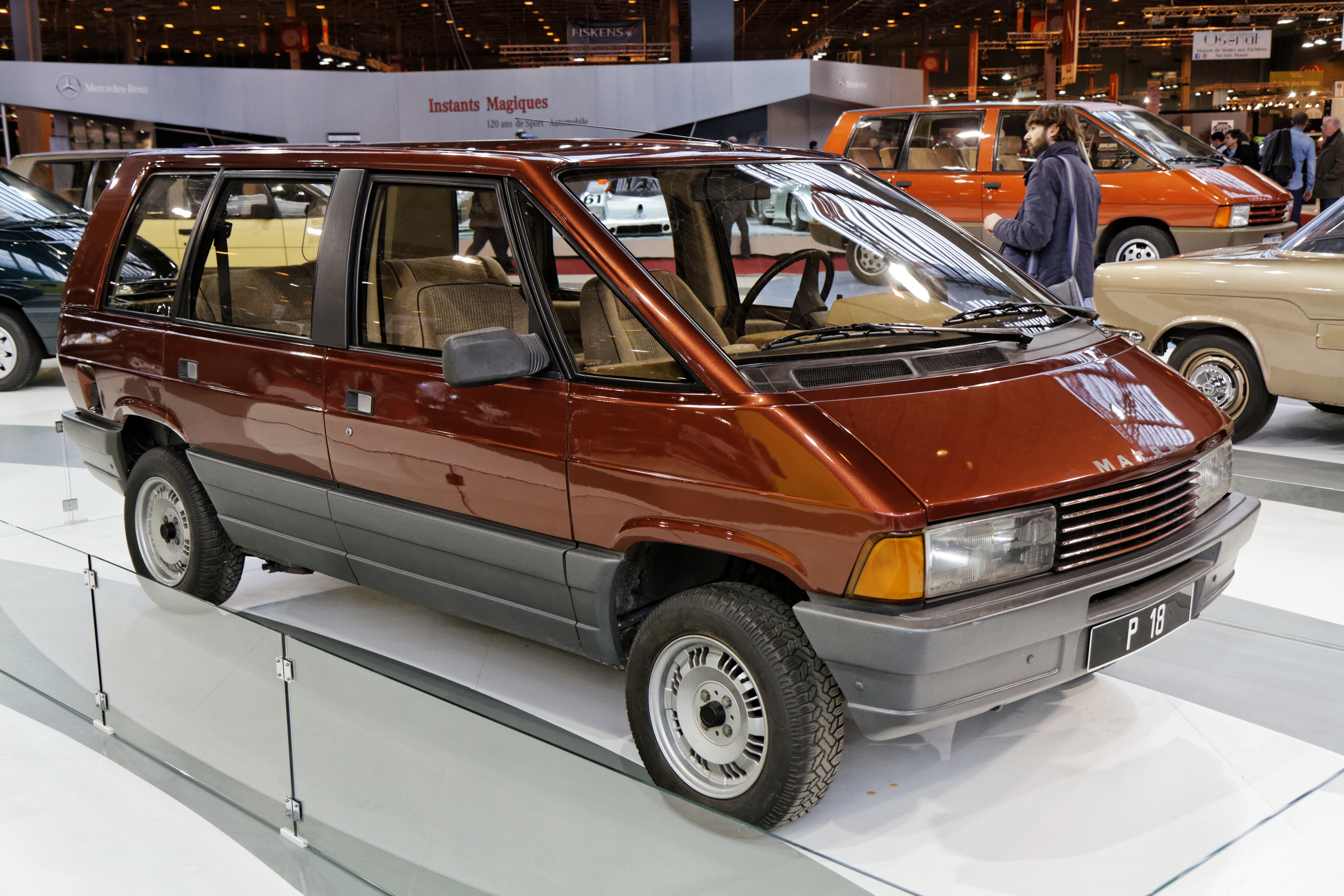 Une Matra Projet P18 présentée lors du salon Retromobile 2014.